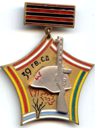 Памятный знак 39-й гвардейской стрелковой дивизии